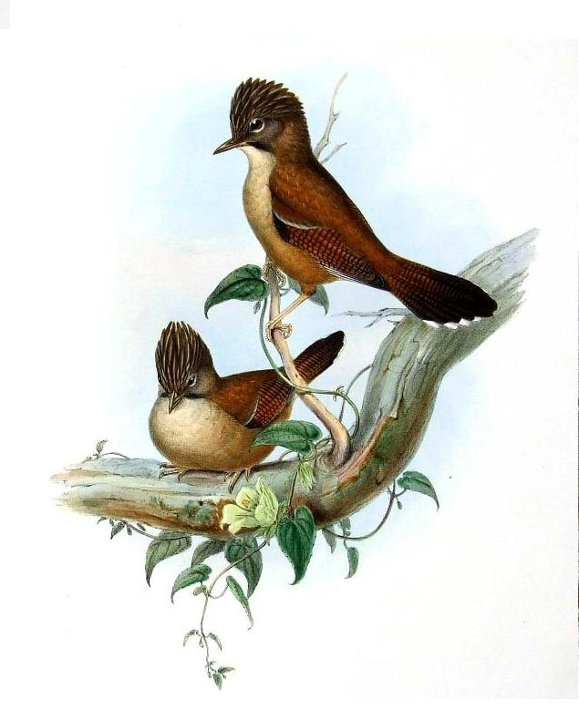 Actinodure du Népal